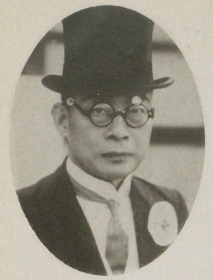 久世庸夫（1875-1945）